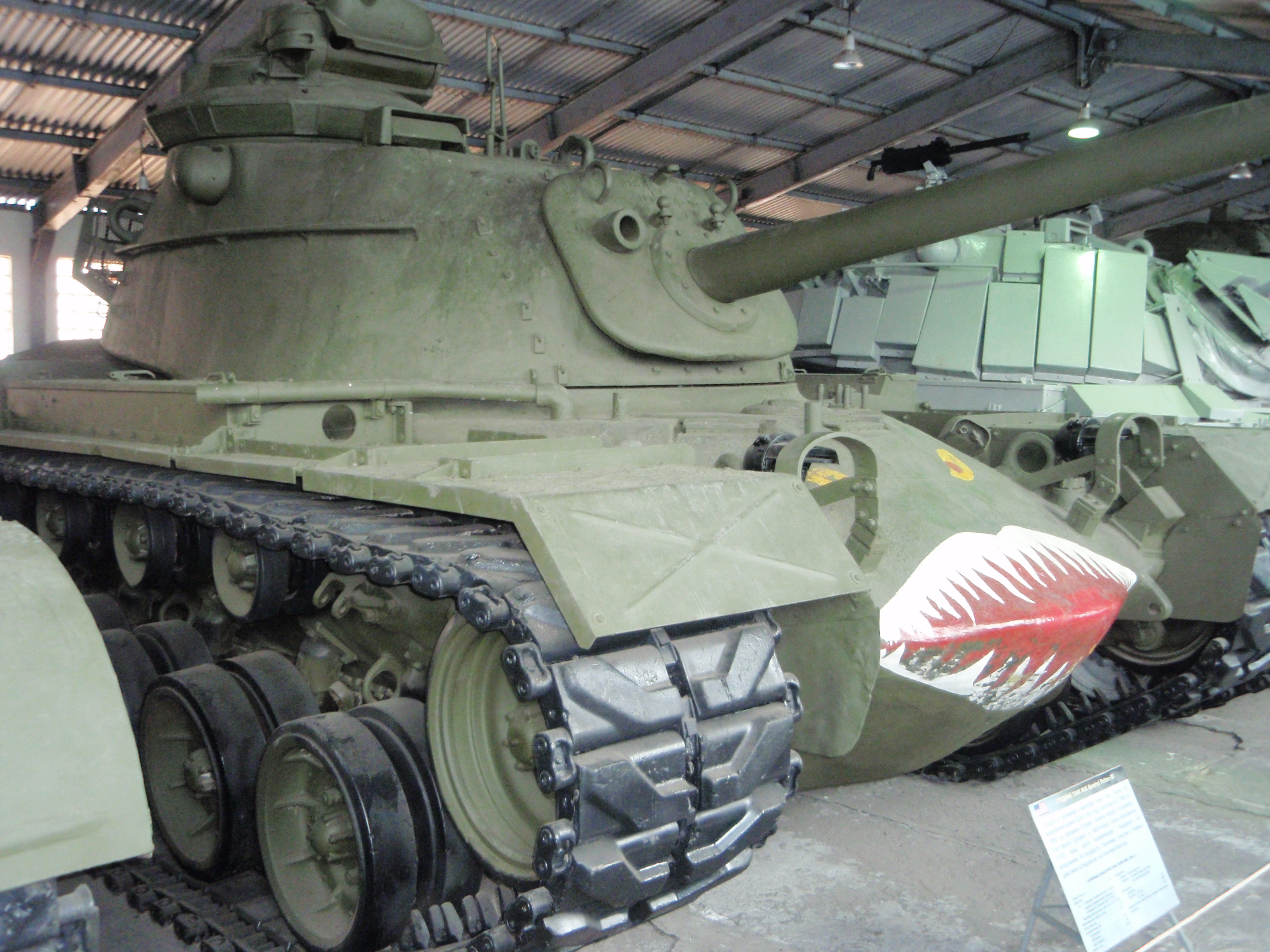 Американский средний танк M48 (General Patton III) в Кубинке